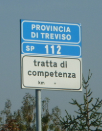 provincia di treviso - strada